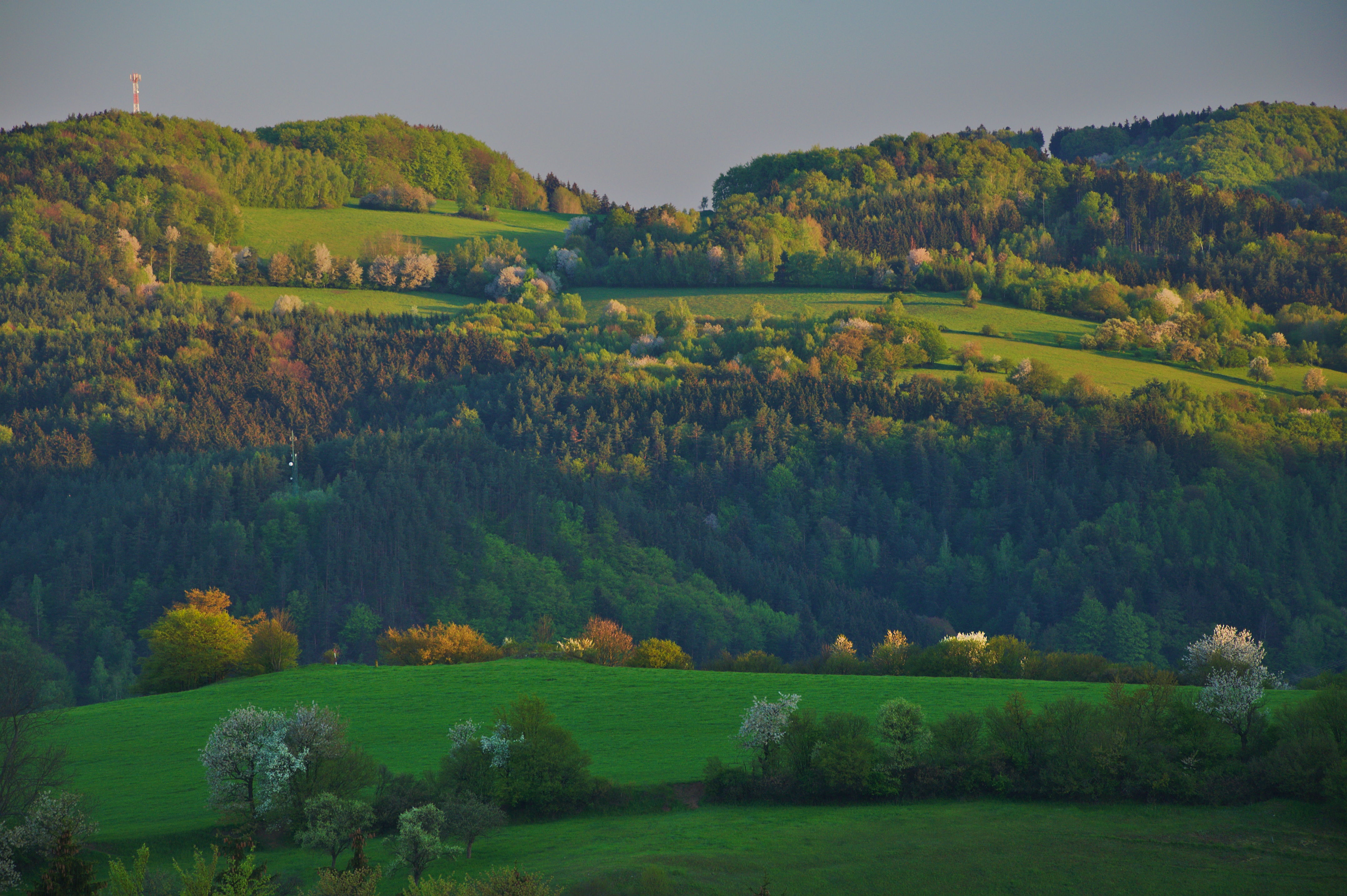 Kozlovská horka z Kopicova vrchu, okres Žďár nad Sázavou